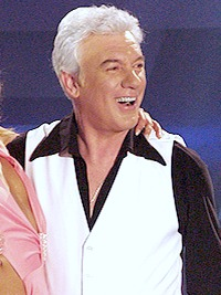 El presentador de televisión chileno Antonio Vodanovic participando en el programa de Canal 13, Locos por el baile.